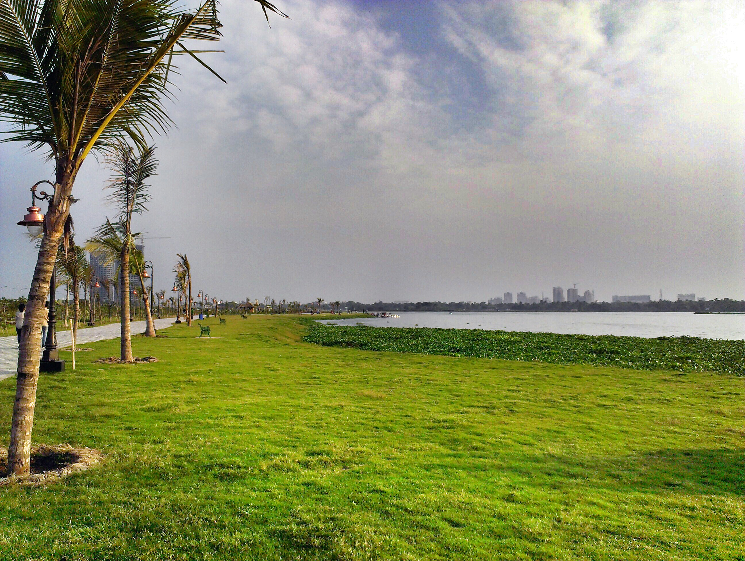 Eco Park, Rajarhat, Kolkata, India